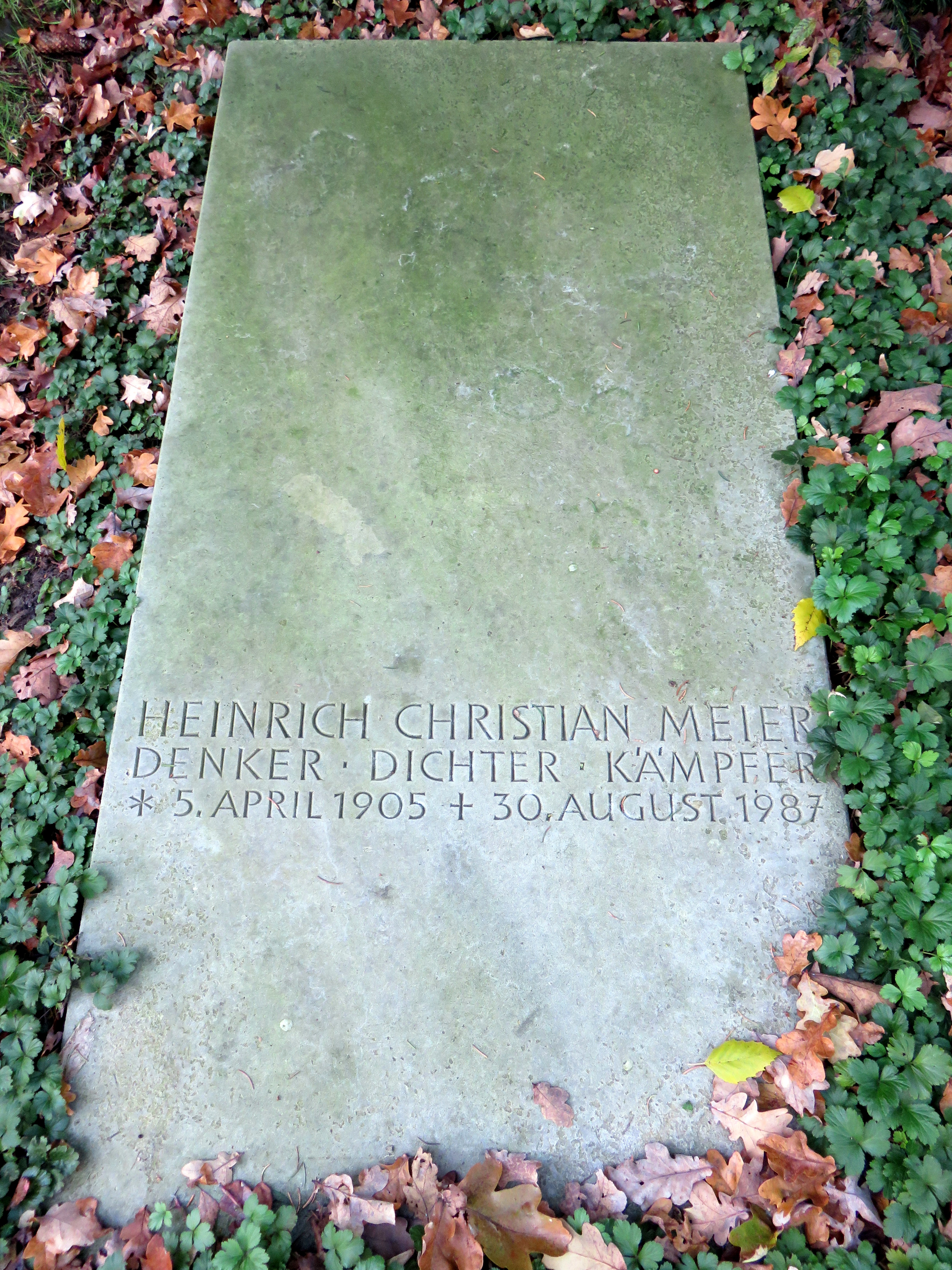 Grab des deutschen Schriftstellers Heinrich Christian Meier, Friedhof Ohlsdorf, Planquadrat AD 5 (westlich Kapelle 8, am Beginn des Stillen Weges im Bereich der “Dichterecke”).